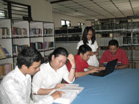 Perpustakaan STIKI